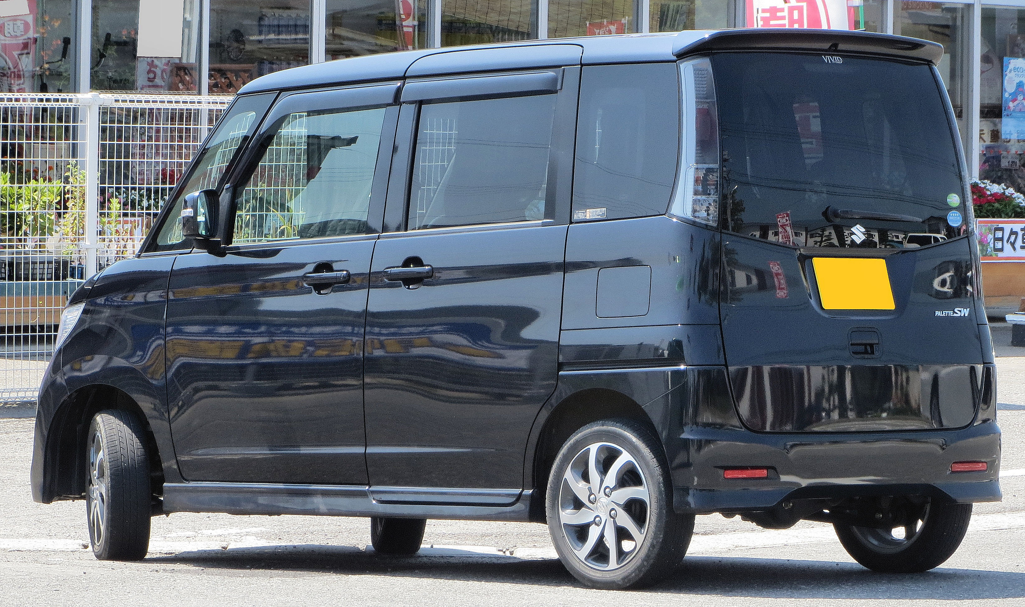 スズキ・パレットSW